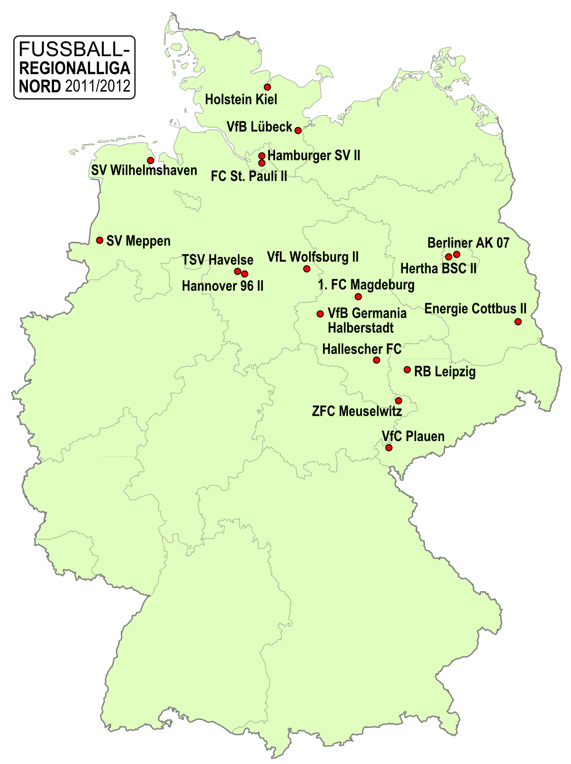 Karte der Vereine der Fußball-Regionalliga Nord, Saison 2011/2012